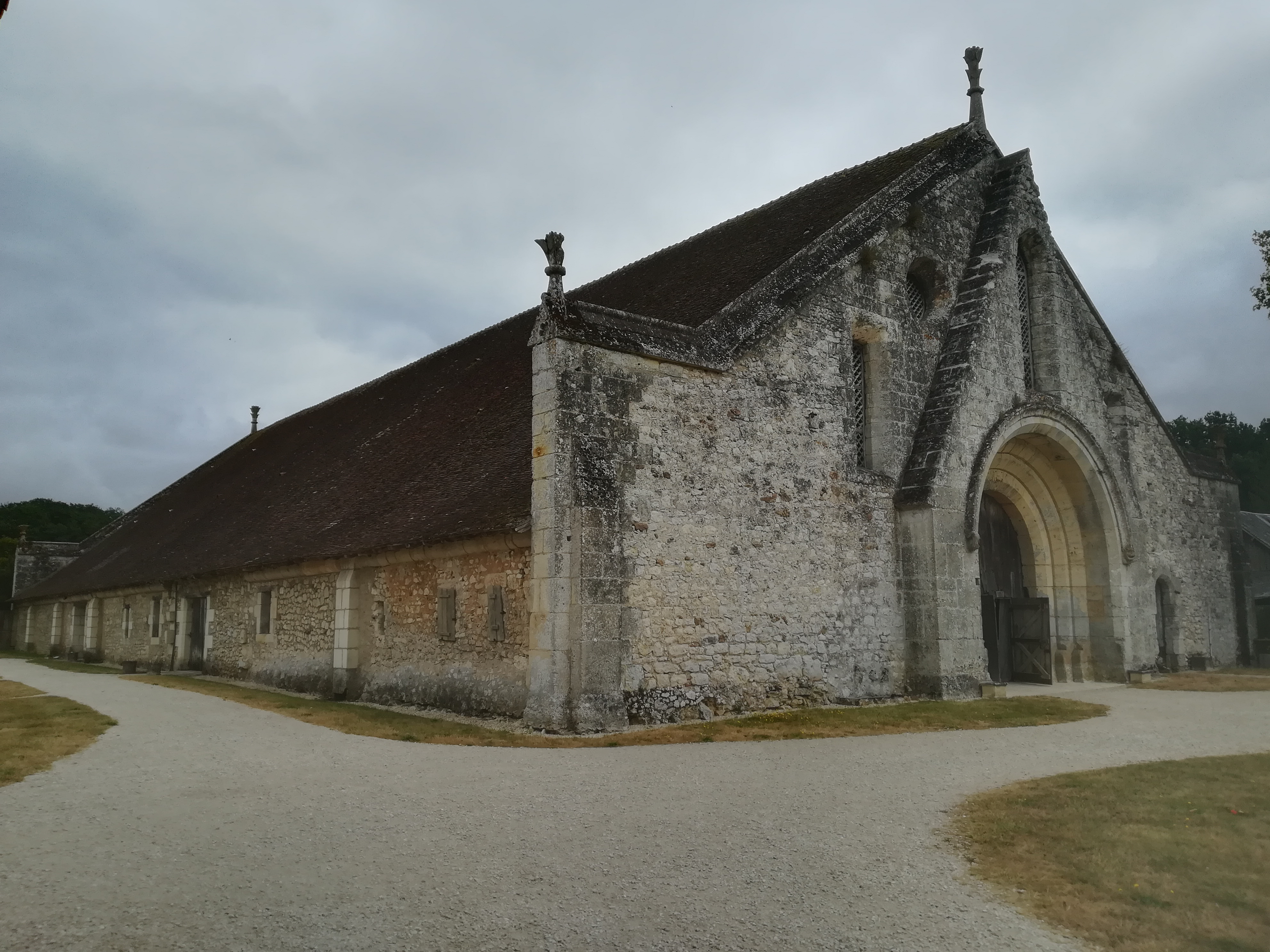 Grange de Meslay se déployant dans toute sa longueur (60m), avec son toit de tuiles. Largeur de 25m, hauteur de 17m.